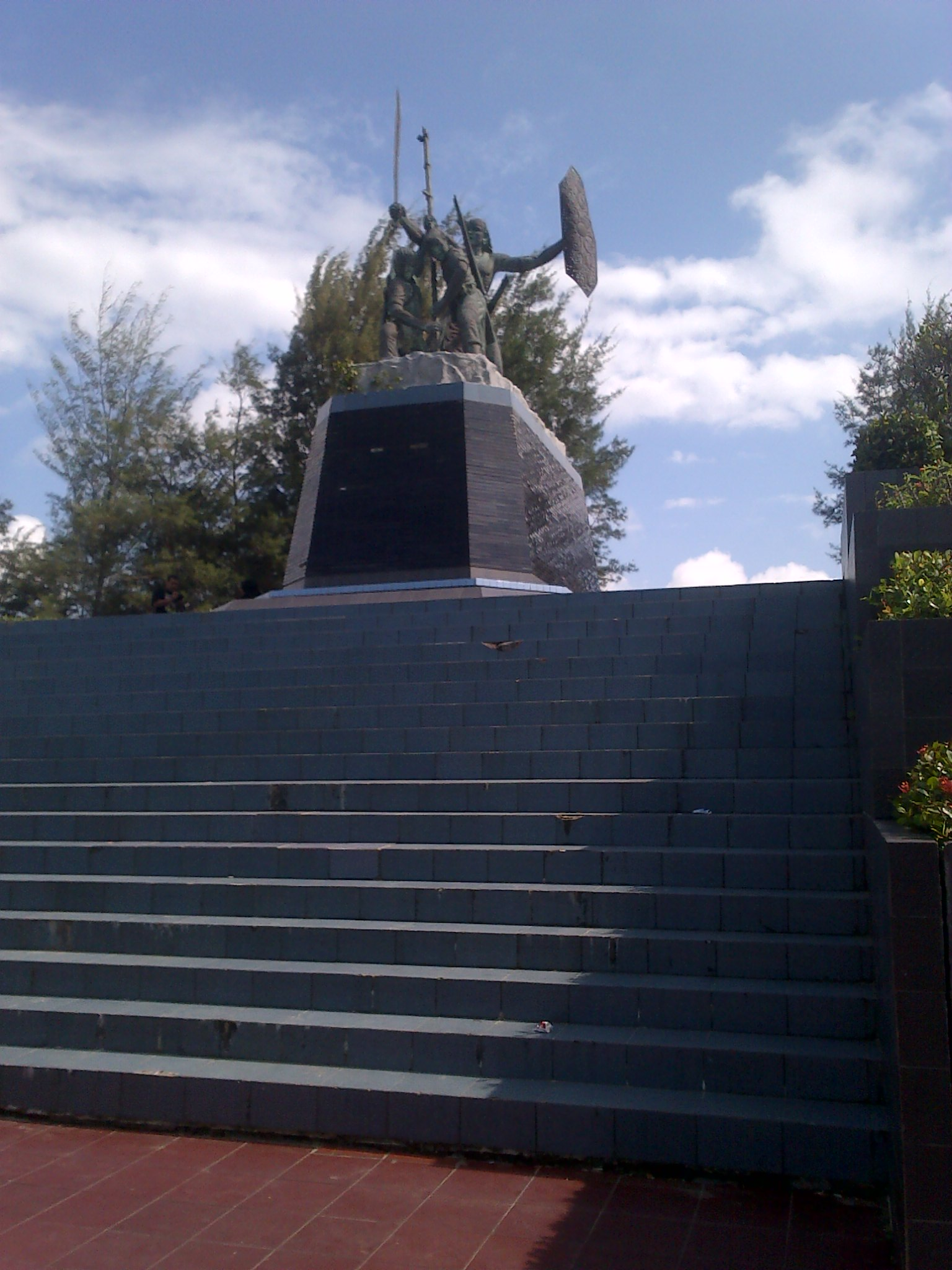 Tugu Monumen Perjuangan Rakyat (Monpera)